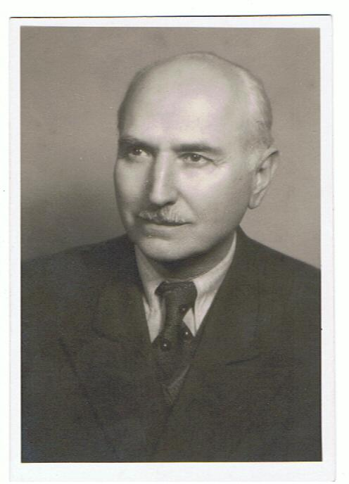 Architekt a stavitel